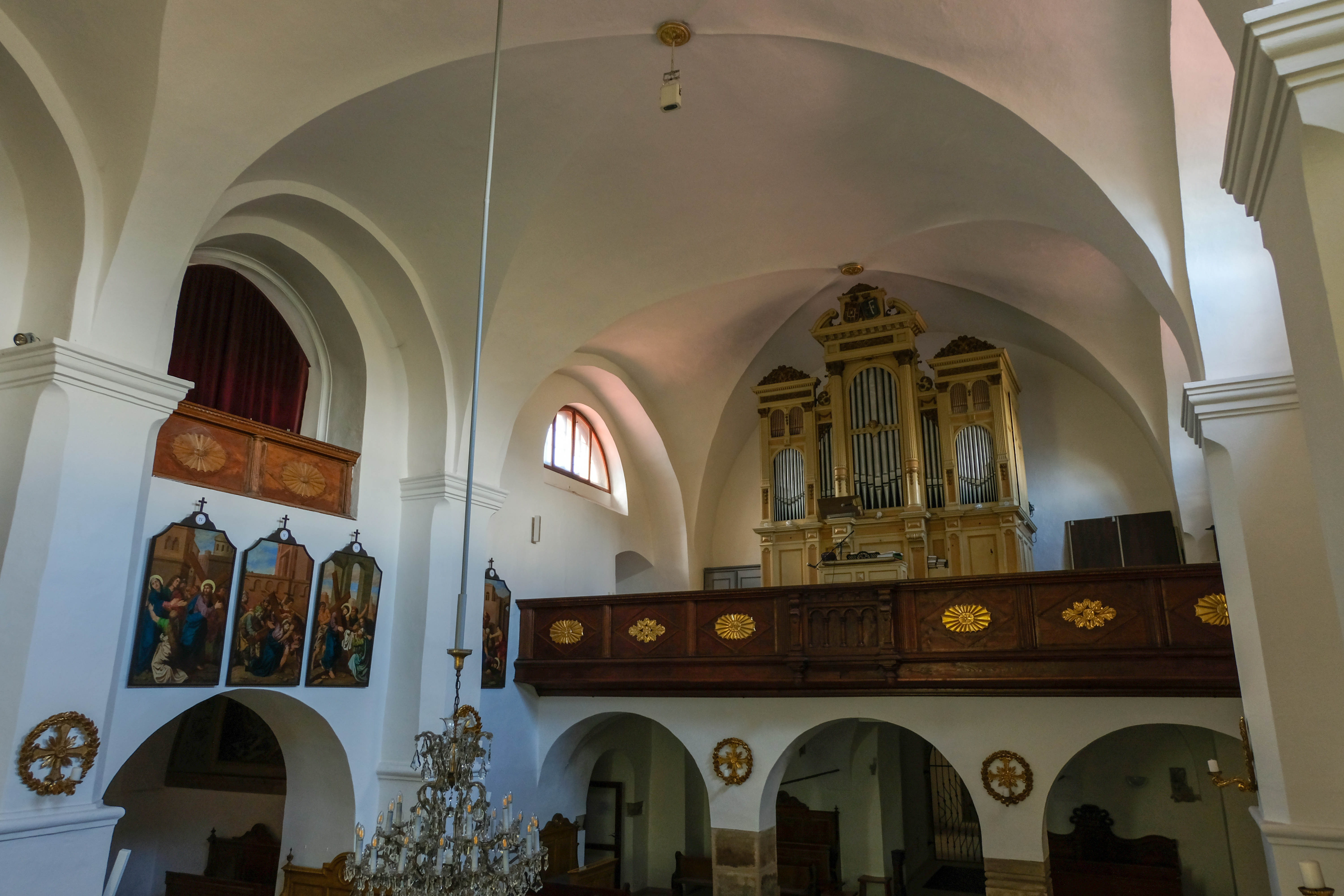 kruchta